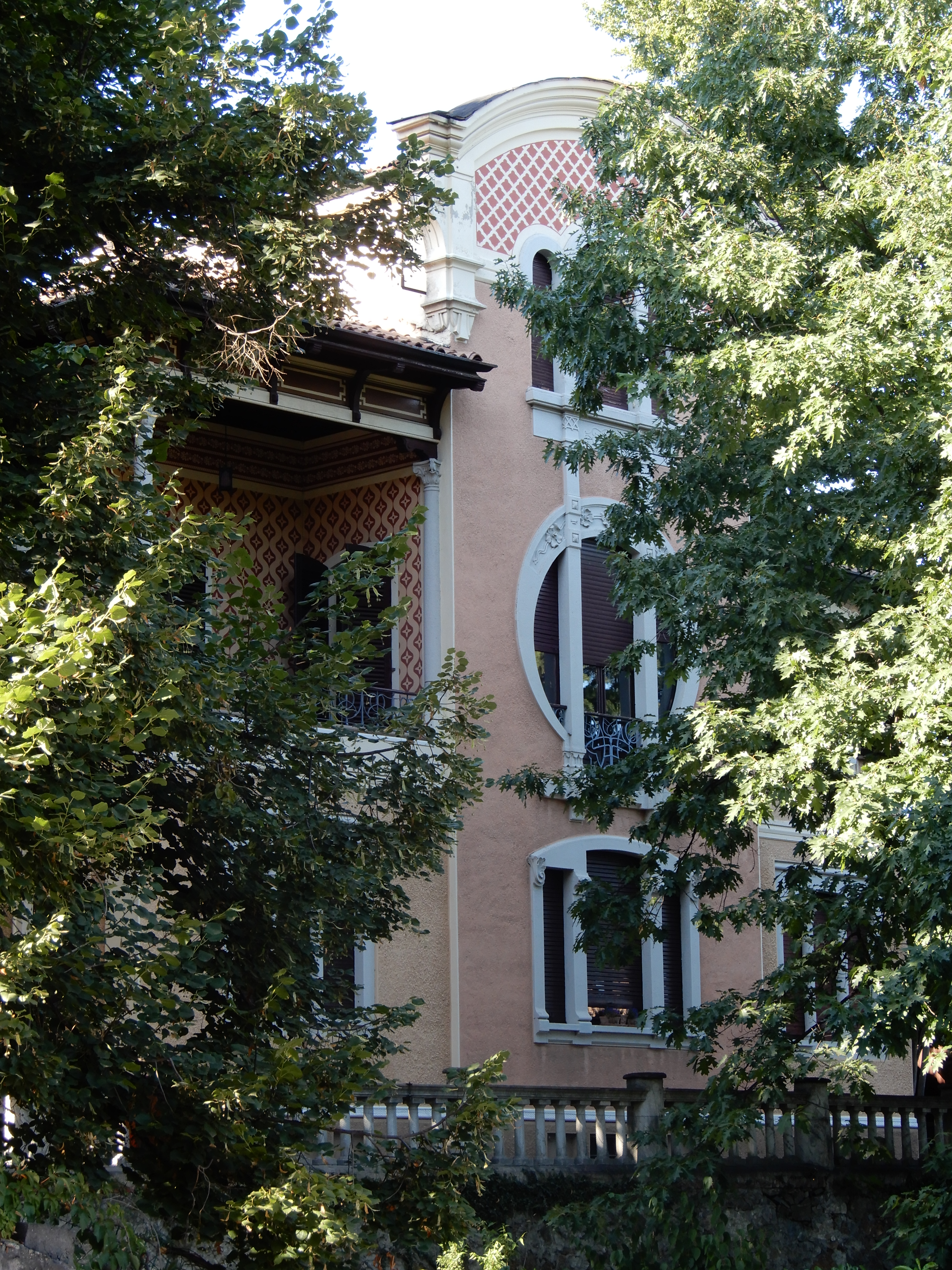 Villa Lacchia, Ivrea